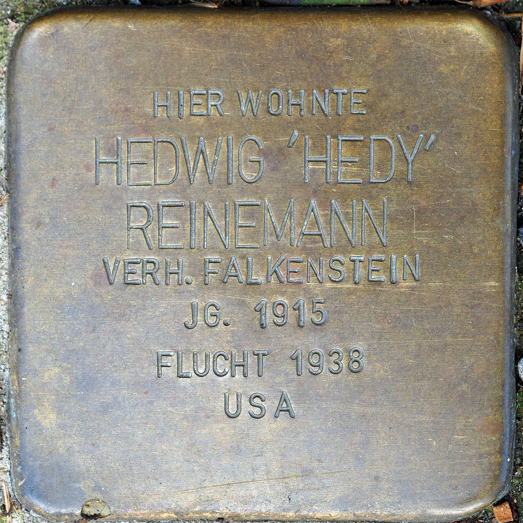 Stolpersteine MG: Reinemann, Hedwig